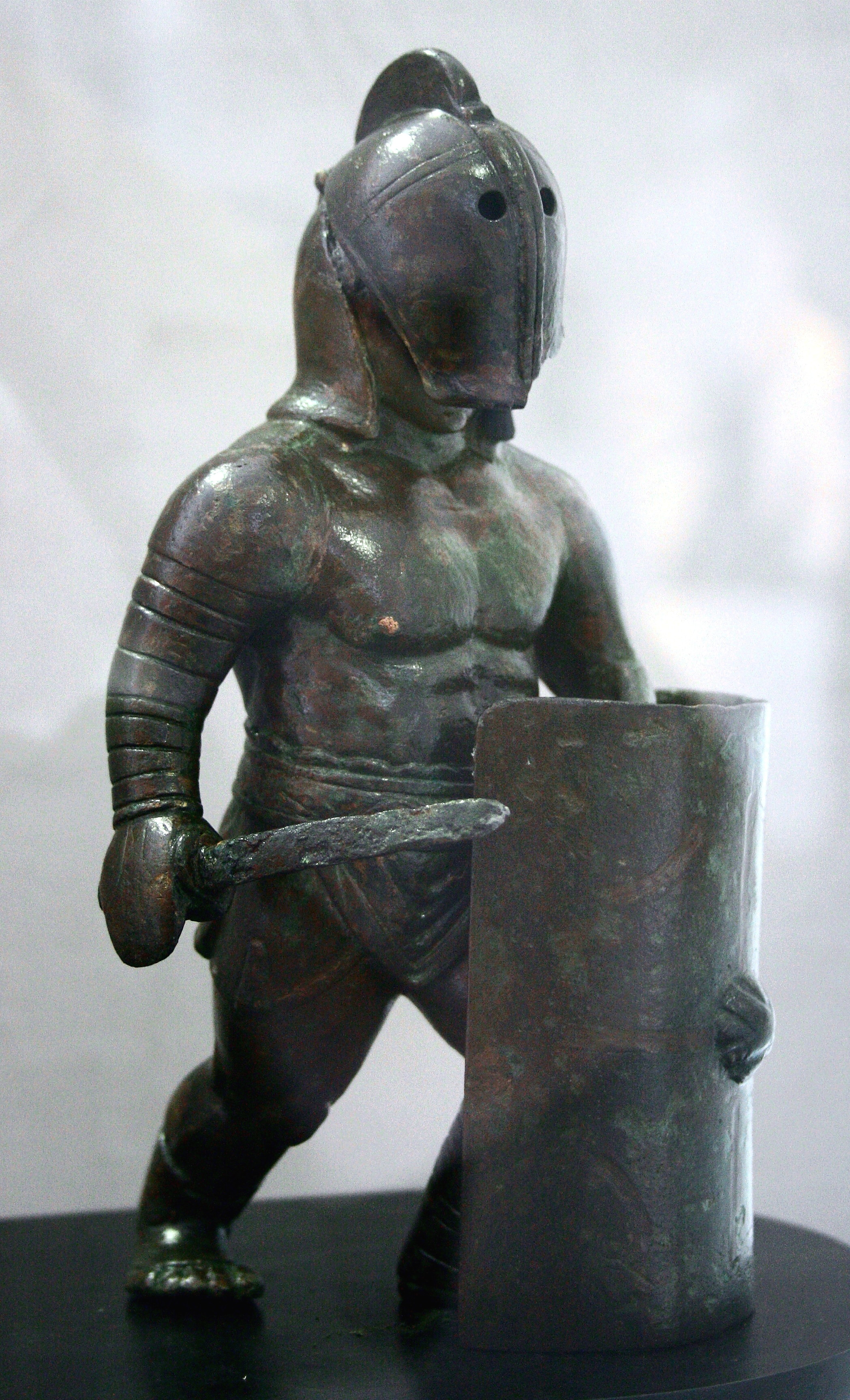 Statue de gladiateur samnite, Musée de l'Arles et de la Provence antiques, Arles, France